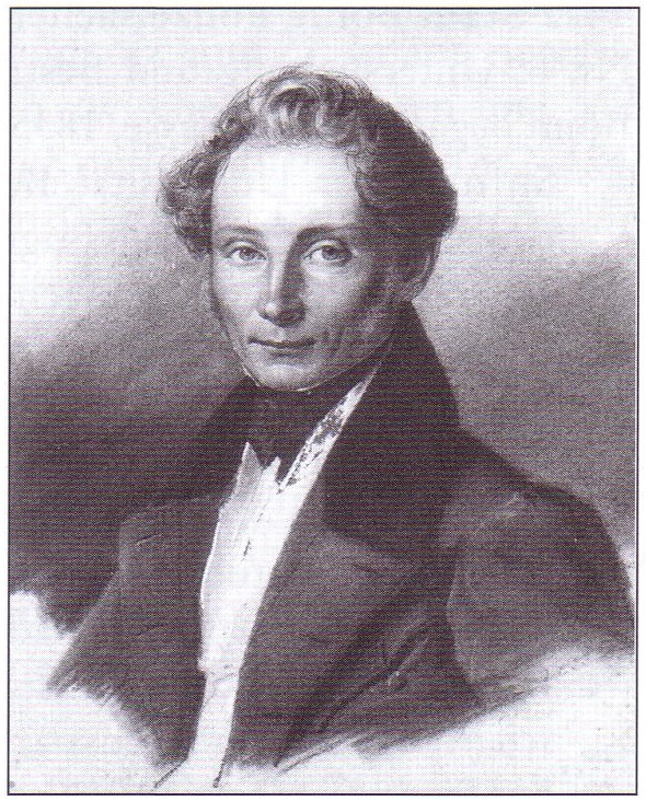 Fotografie eines Pastells von Gustav Adolf von Tzschoppe (1794-1842)